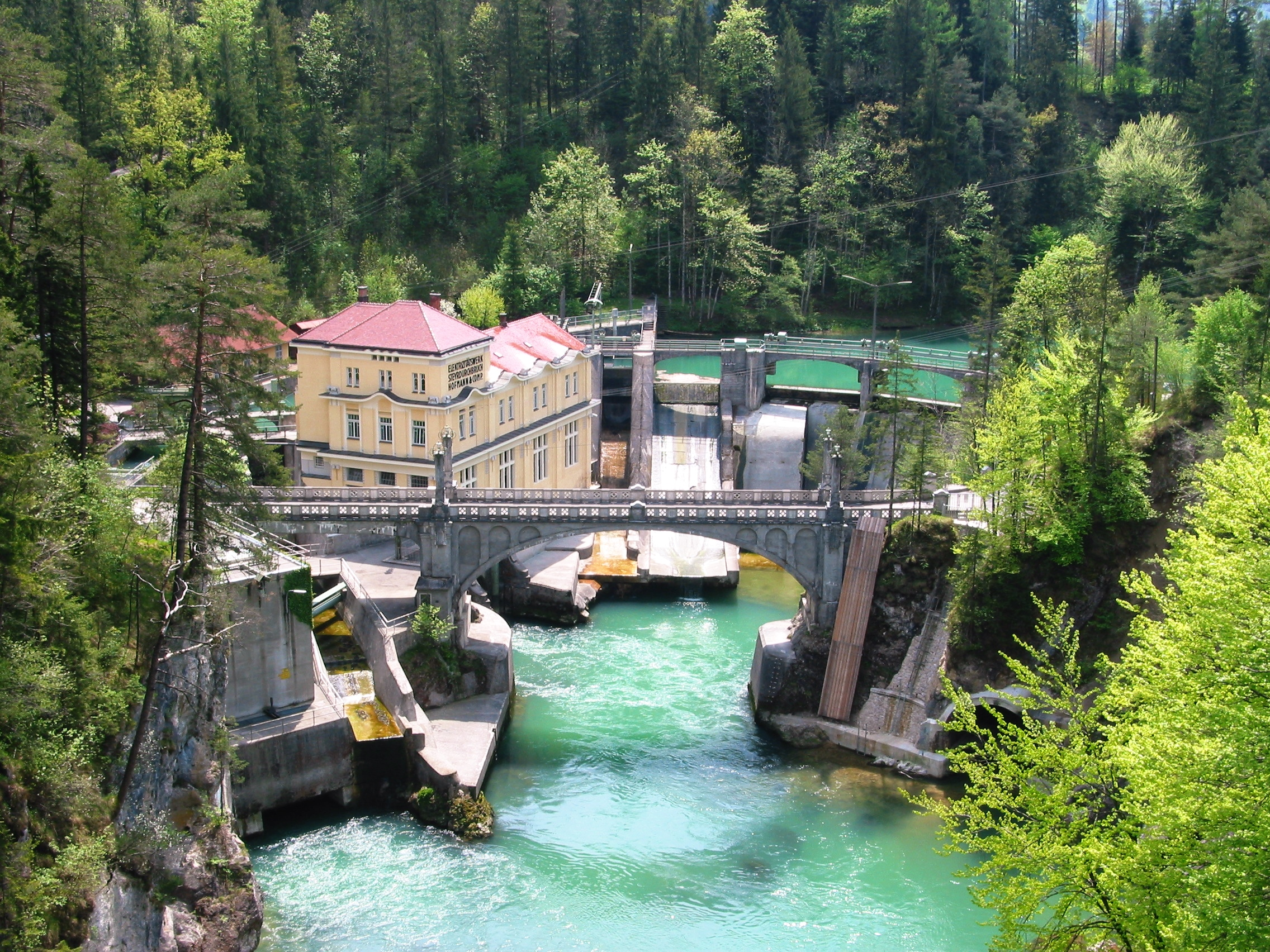 Das Kraftwerk Steyrdurchbruch ist ein seit 1908 bestehendes Laufkraftwerk am Steyrfluss.